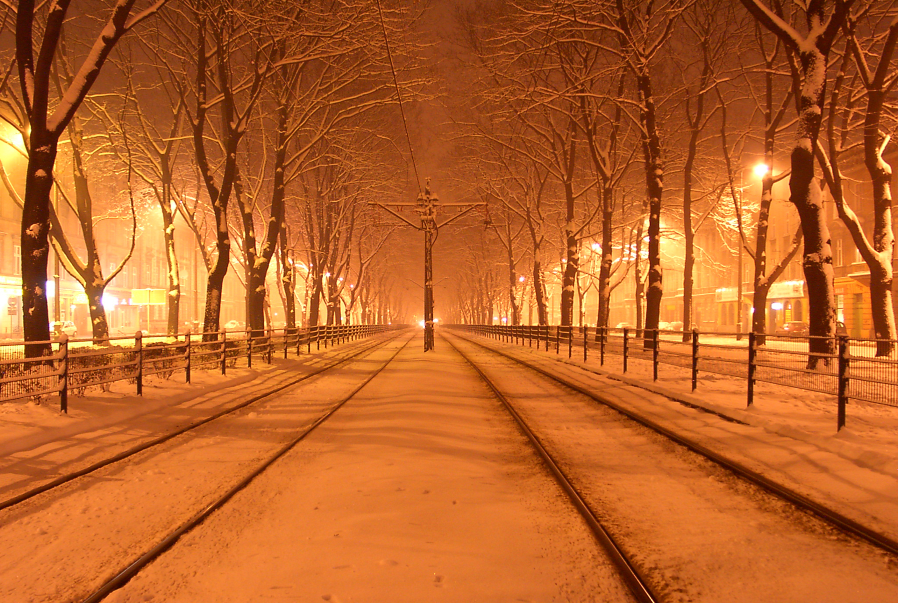 Planty Dietlowskie w Krakowie. Autor: Marcin Mastykarz (Mastyk)